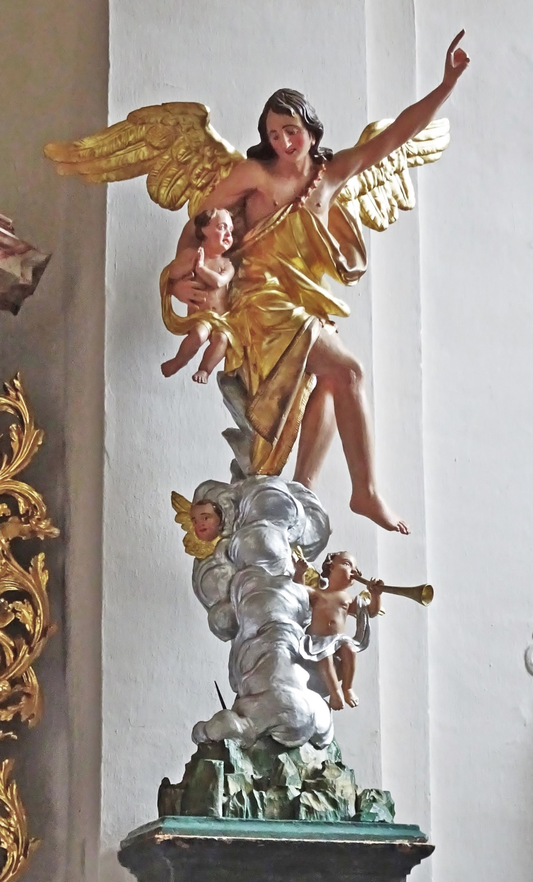 Kath. Pfarrkirche Obervellach, Schutzengelgruppe